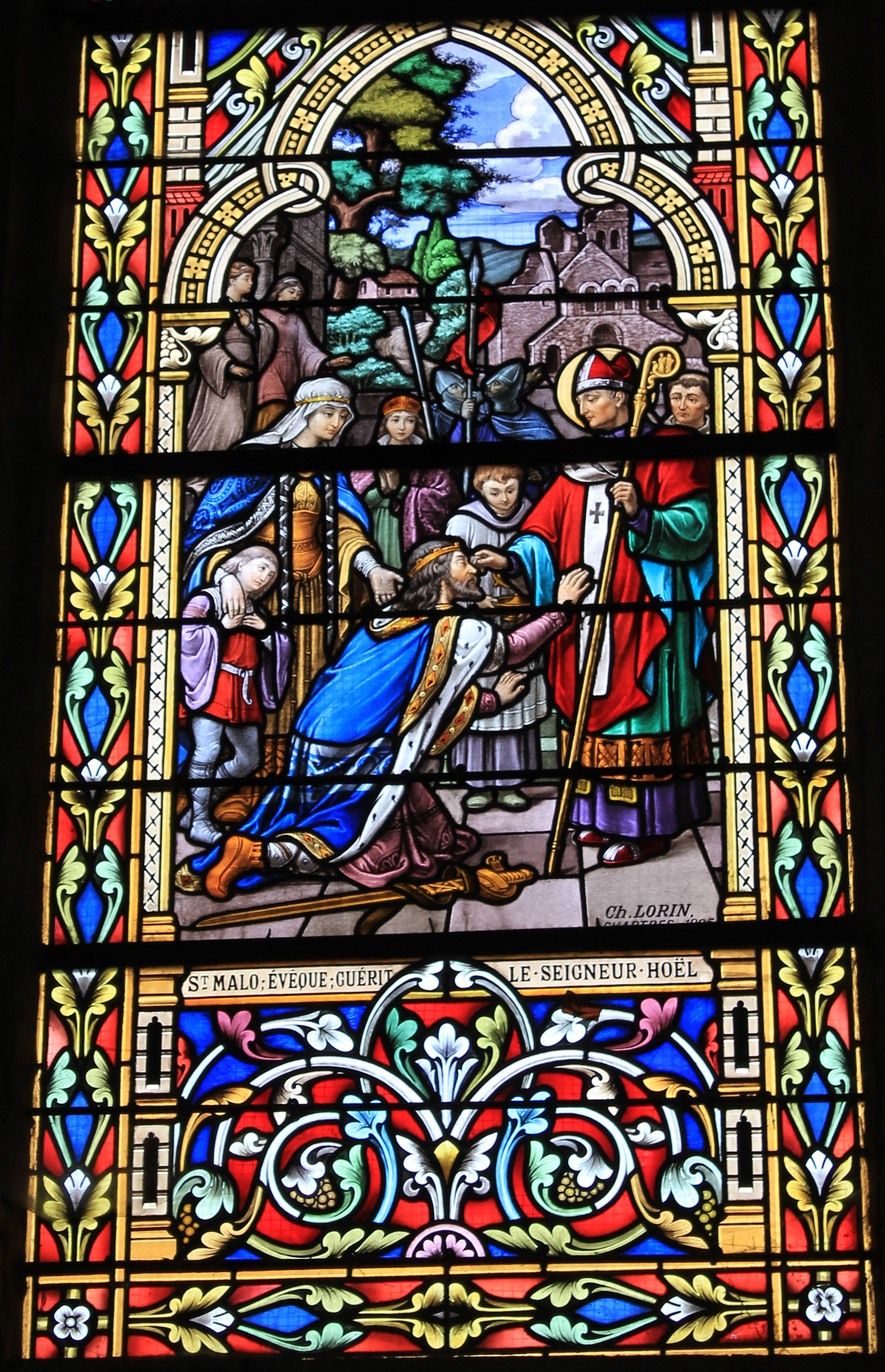 Église Saint-Clair (Réguiny) Saint-Malo évêque guérit de seigneur Hoël, signature Ch.Lorin, Chartres 1905